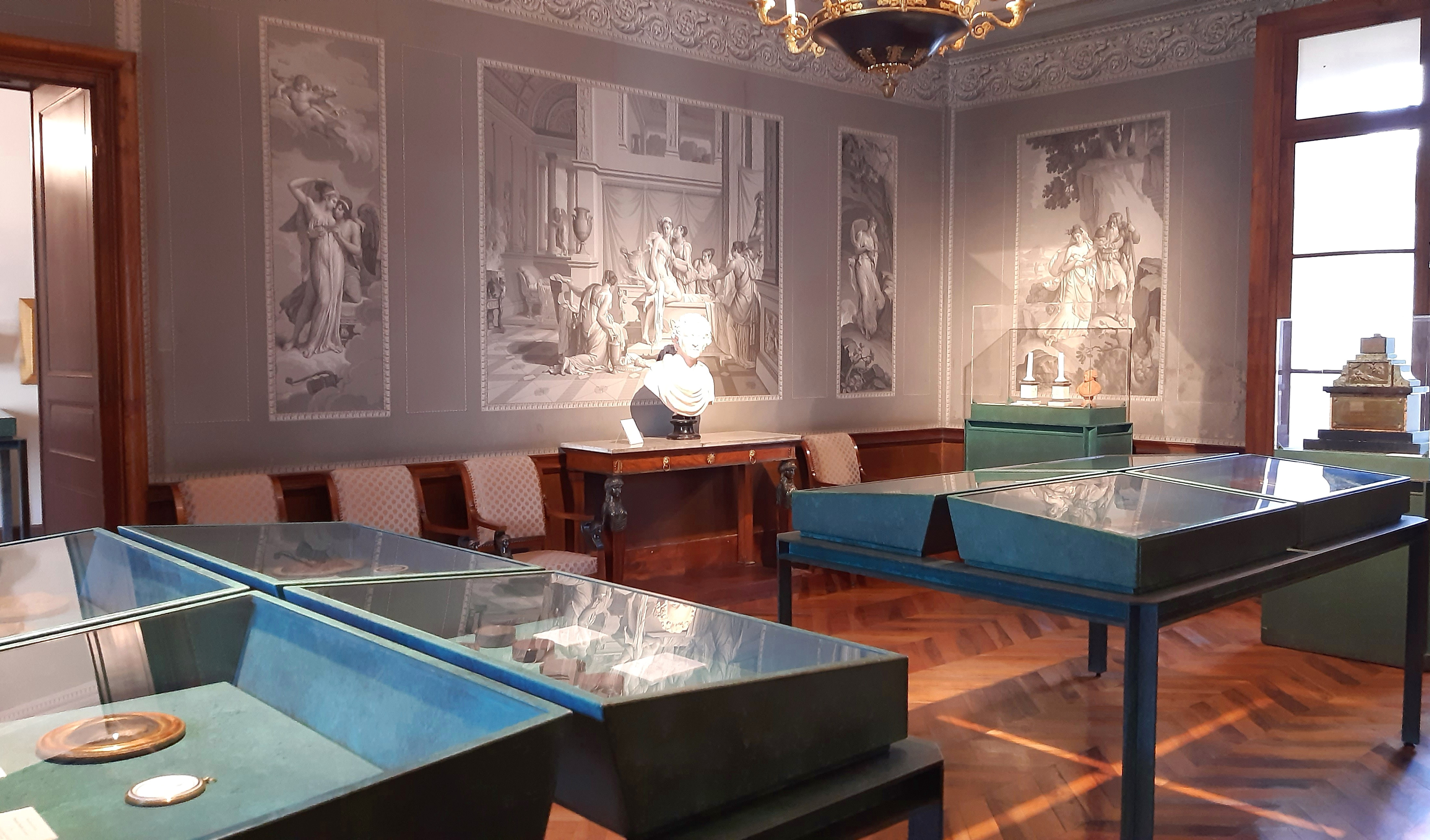 Salle Psyché - Musée de la Révolution française - Vizille